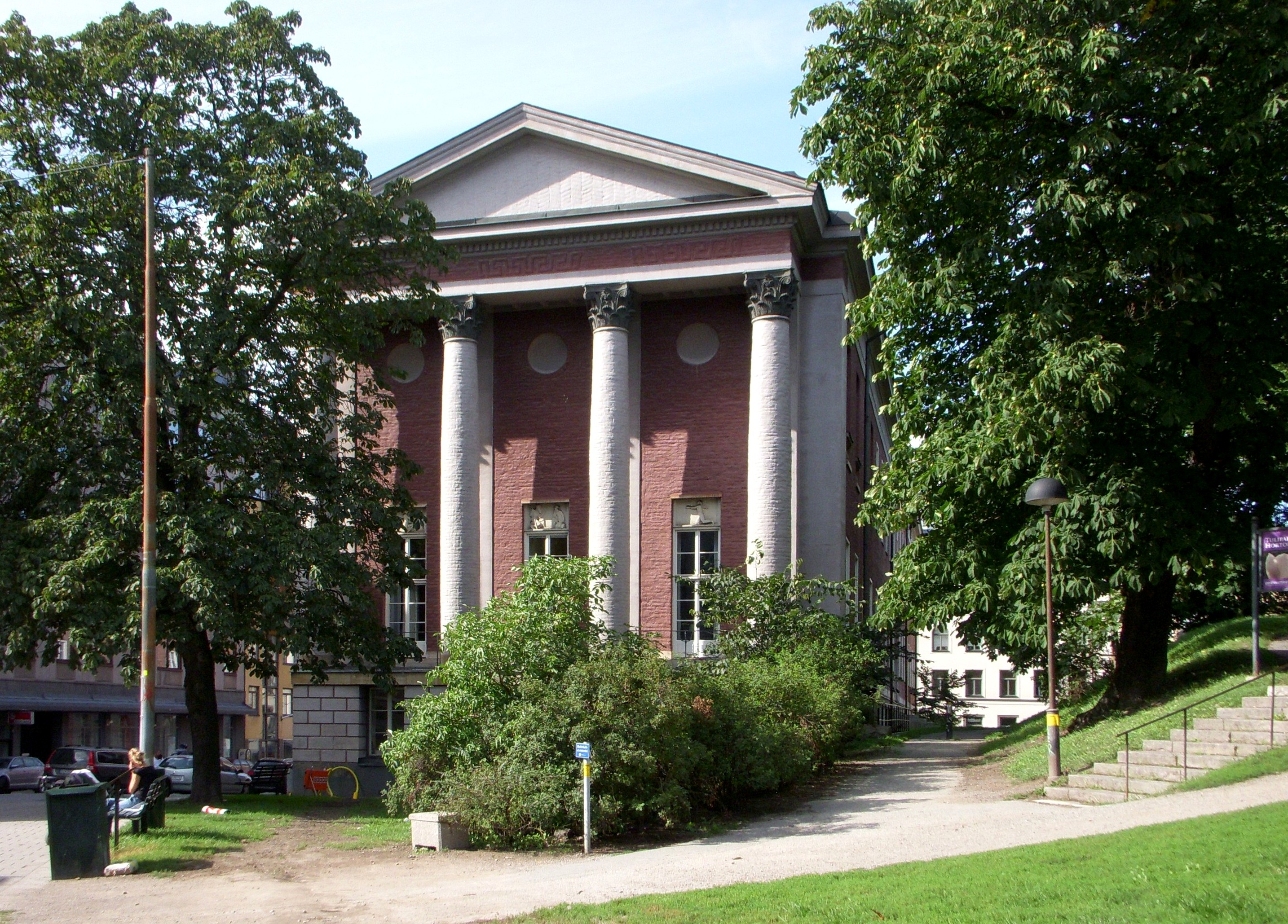 Studentpalatset Stockholm. Fönsteröverstyckenas reliefer av Ivar Johnsson